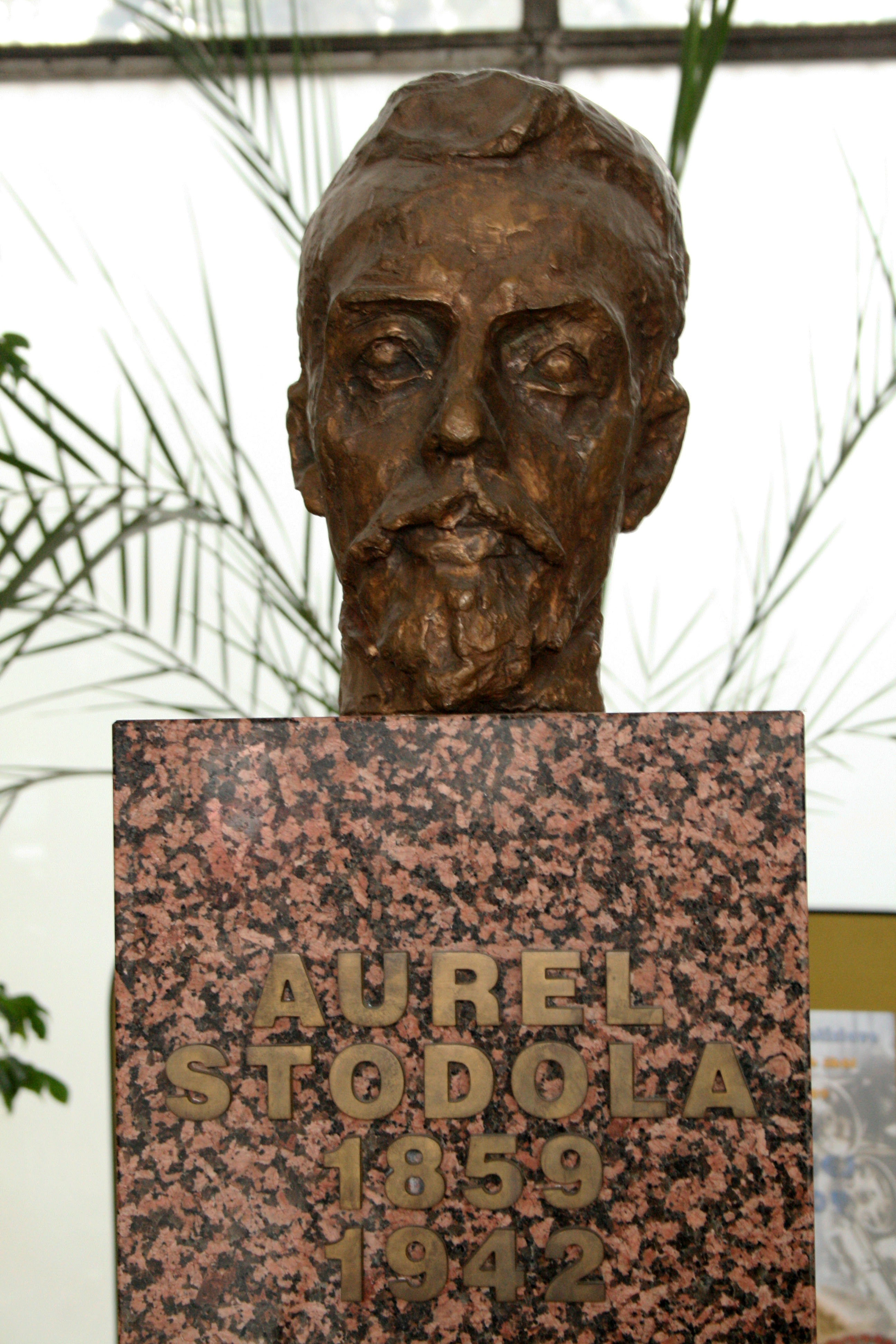 Busta Aurela Stodolu, stojného odborníka, profesora 1893. Špecializoval sa na oblasť teórie automatickej regulácie strojov, položil vedecký základ projekcie a stavby parných a plynových turbín.